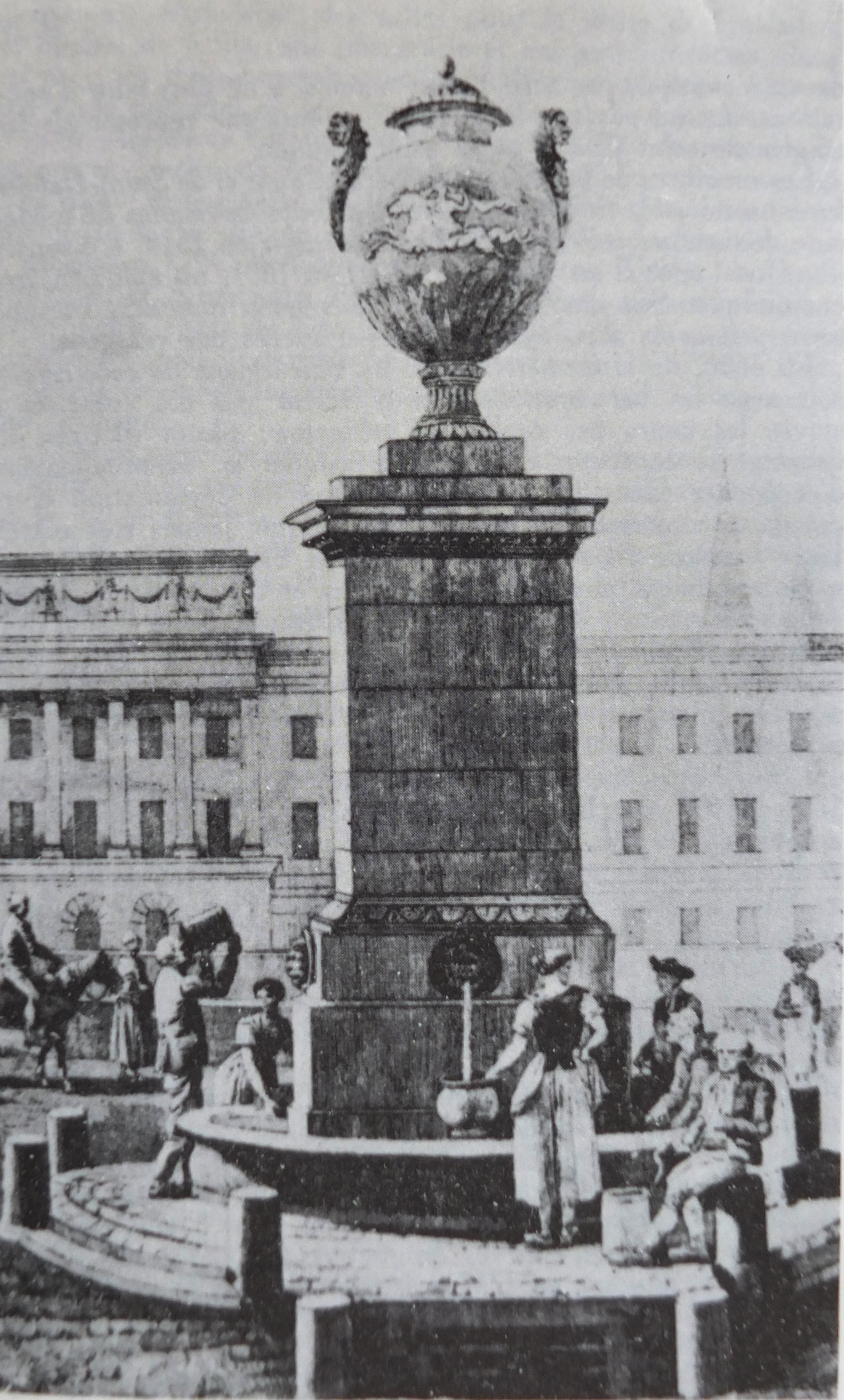 Gravure représentant la Fontaine de la place de l'école (Paris Ier arrond.). Détruite en 1854